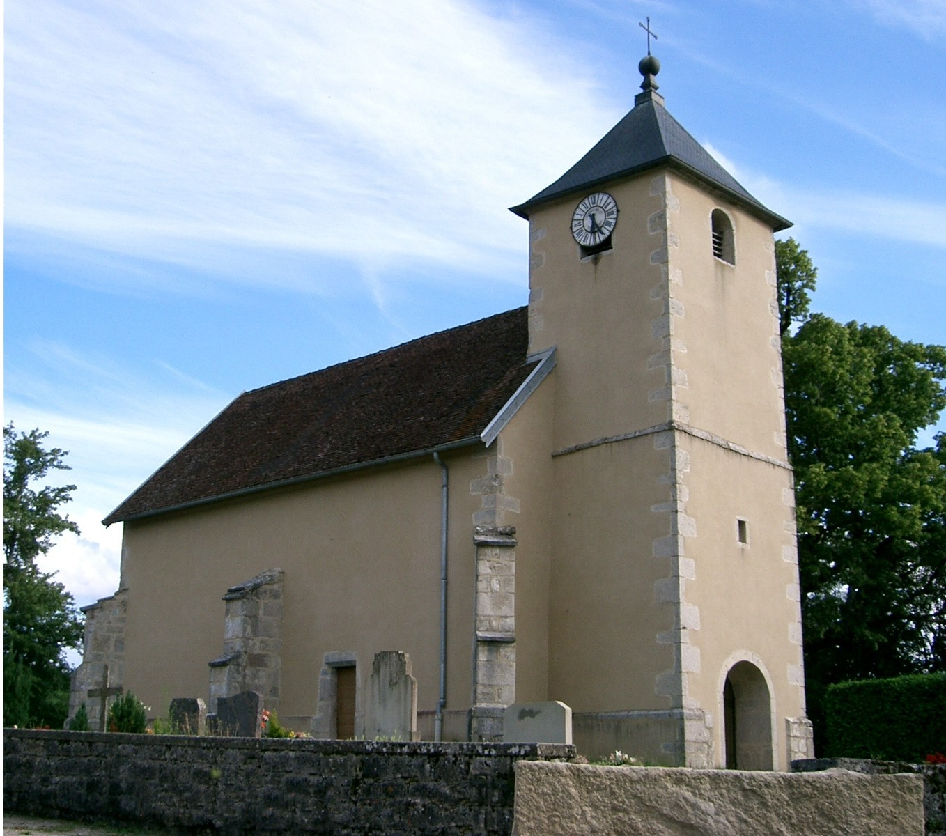 chapelle du XVVe siècle à Fontenu - Jura, France